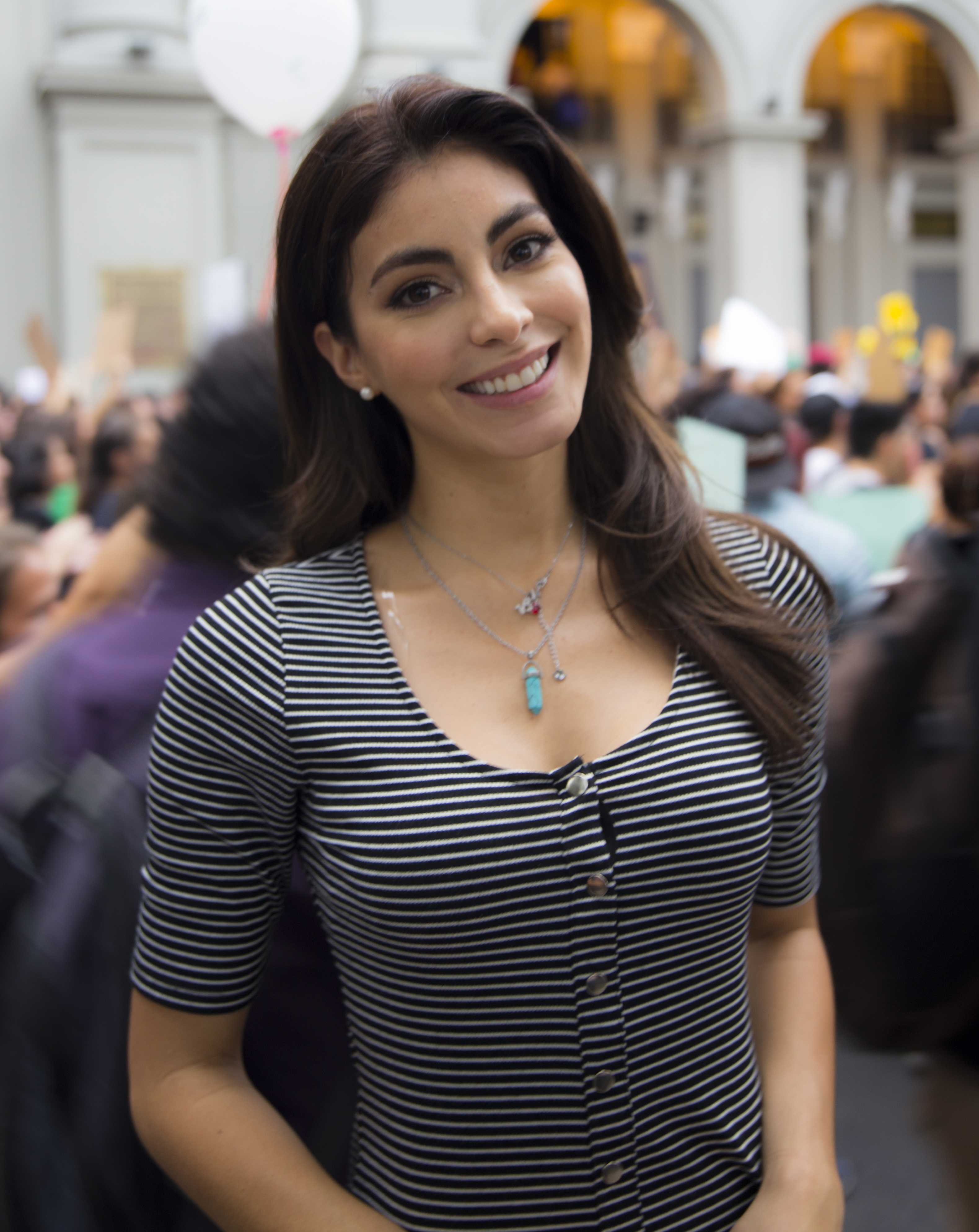 Virginia Limongi frente a la Muy Ilustre Municipalidad de Guayaquil, el lunes 21 de enero de 2019, durante la marcha en contra de la violencia a raíz de los sucesos contra la integridad física y de la vida de dos mujeres, Martha y Diana.